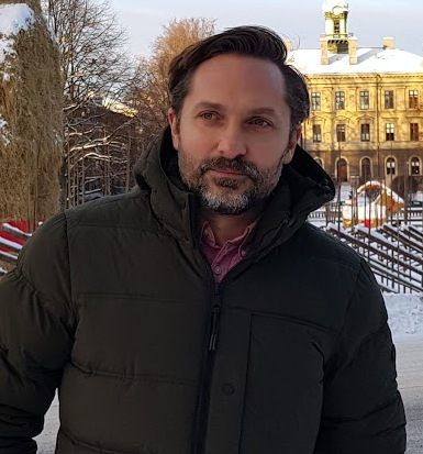 Roger Nordin stående vid julbocken i Gävle med Rådhuset i bakgrunden på julaftonen 2018